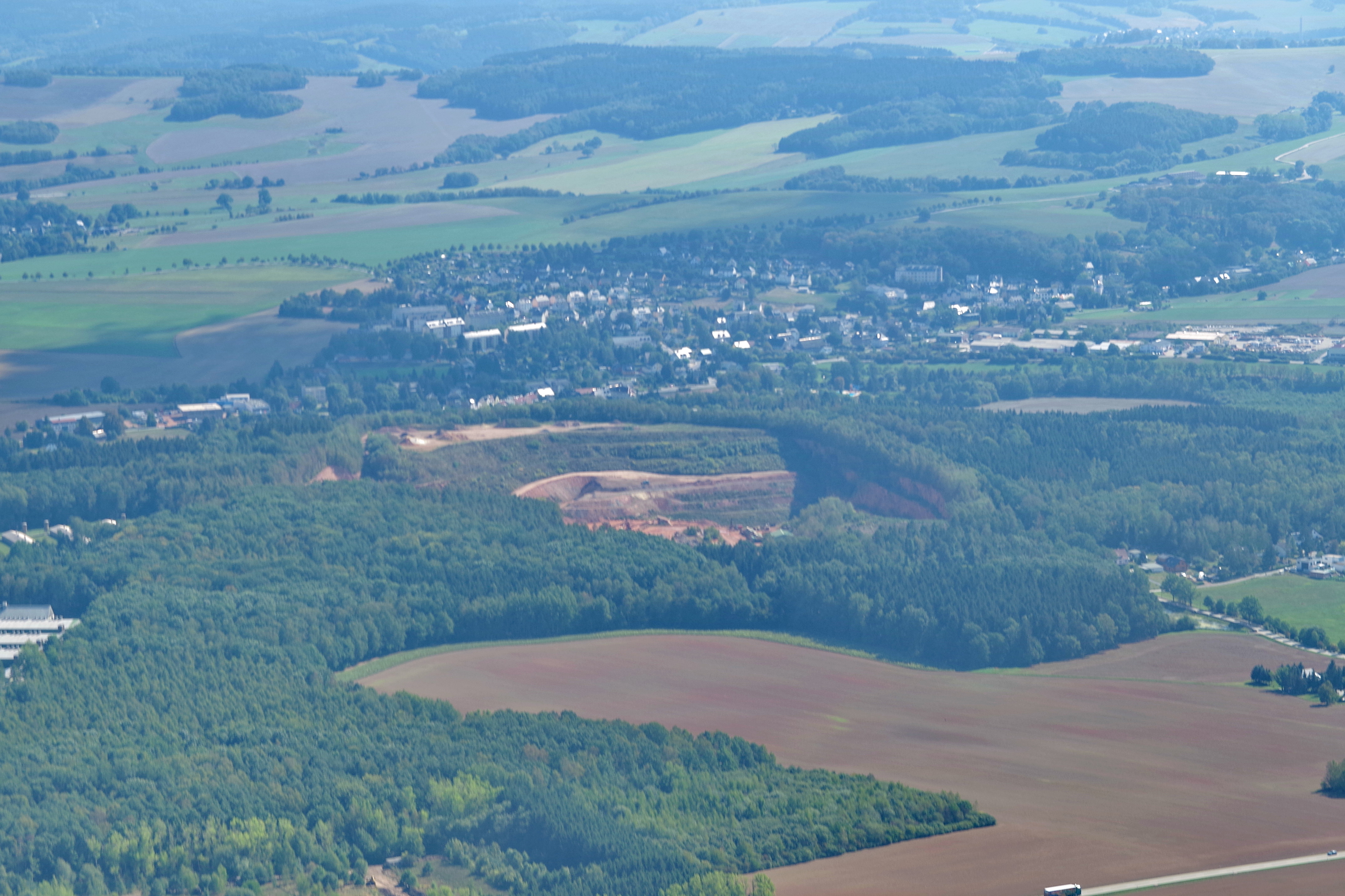 Steinbruch Leukersdorf mit Ort